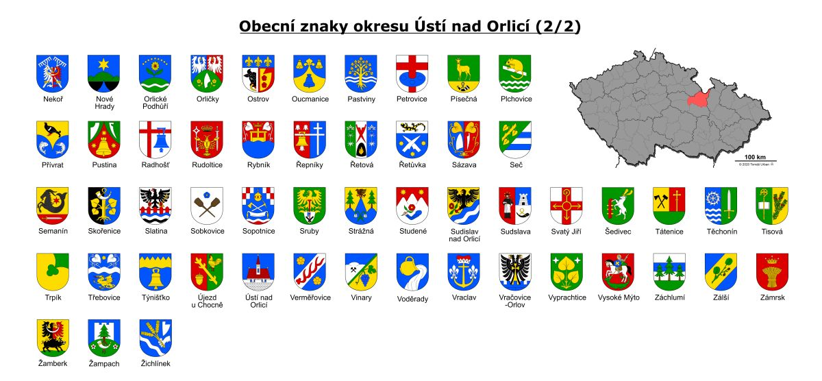 Znaky obcí okresu Ústí nad Orlicí II